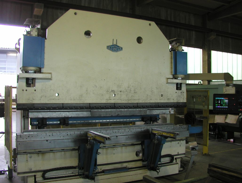 Biegemaschine von Fa. EHT im betrieblichen Umfeld.